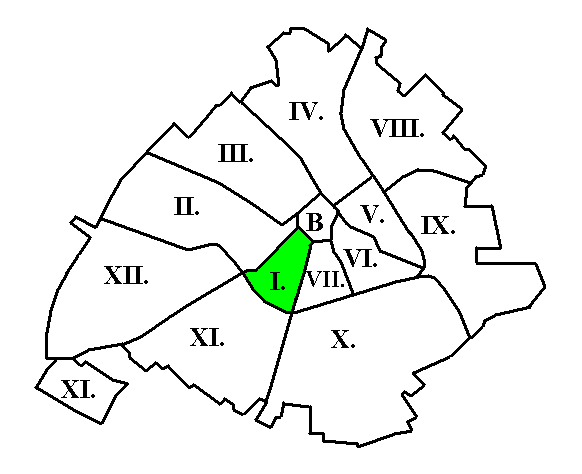 Kecskemét I. kerülete (Árpádváros) a térképen